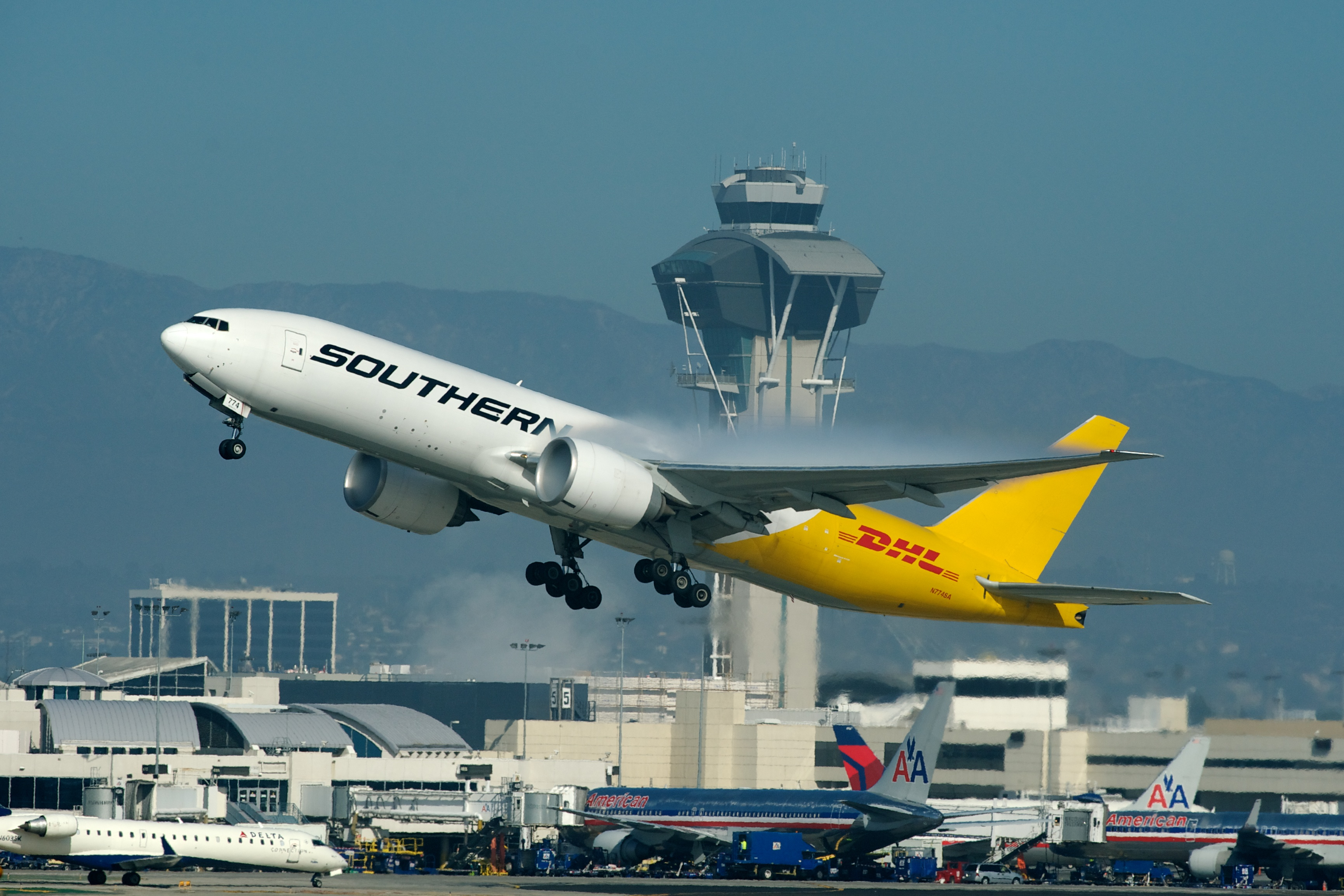 Departing LAX. Operating for DHL.